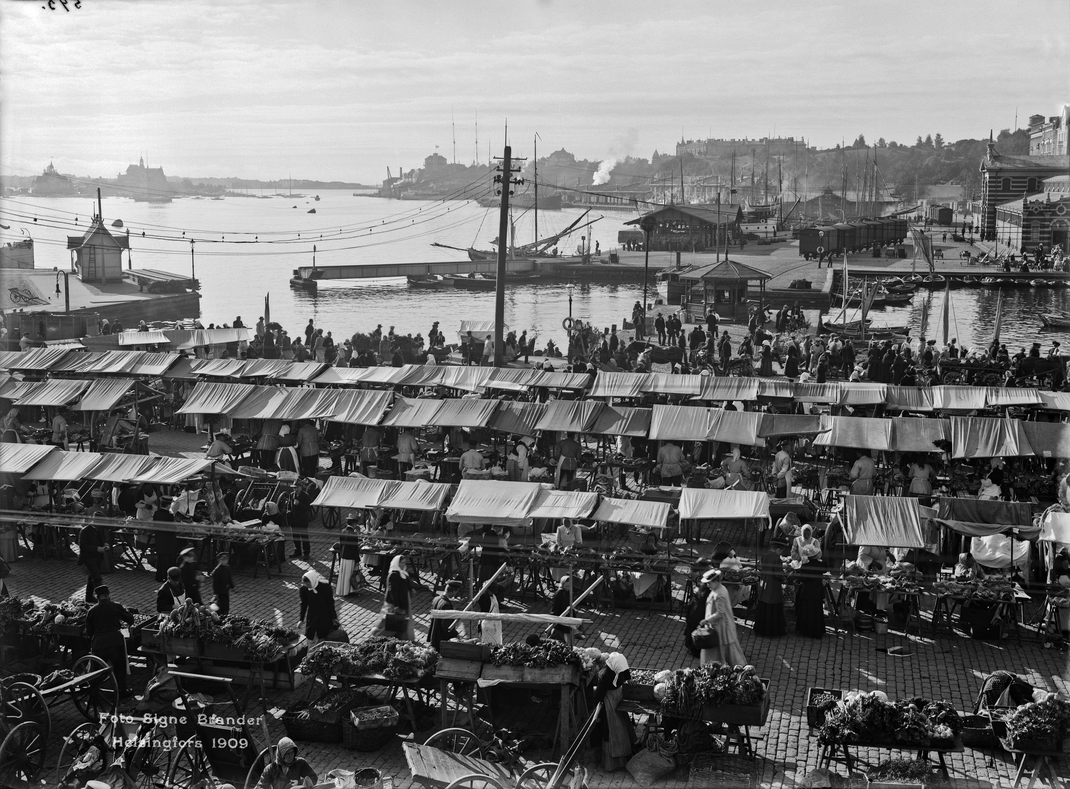 Torikauppaa Kauppatorilla. Taustalla Eteläsatama ja satamarata. -- negatiivi ja vedos, lasi paperi pahvi, mv